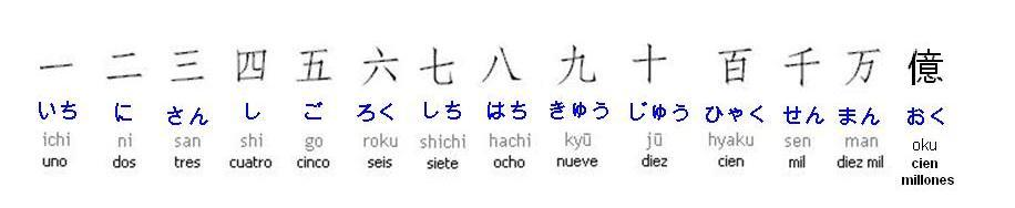 Kanji numeros japoneses